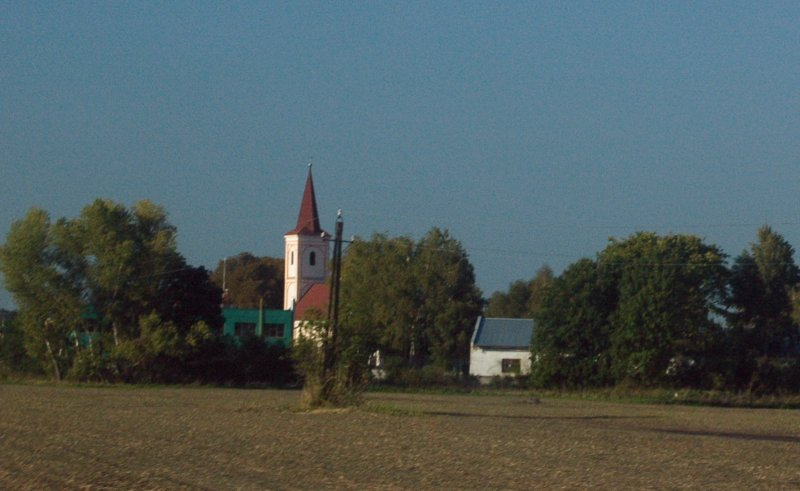 Kuklov